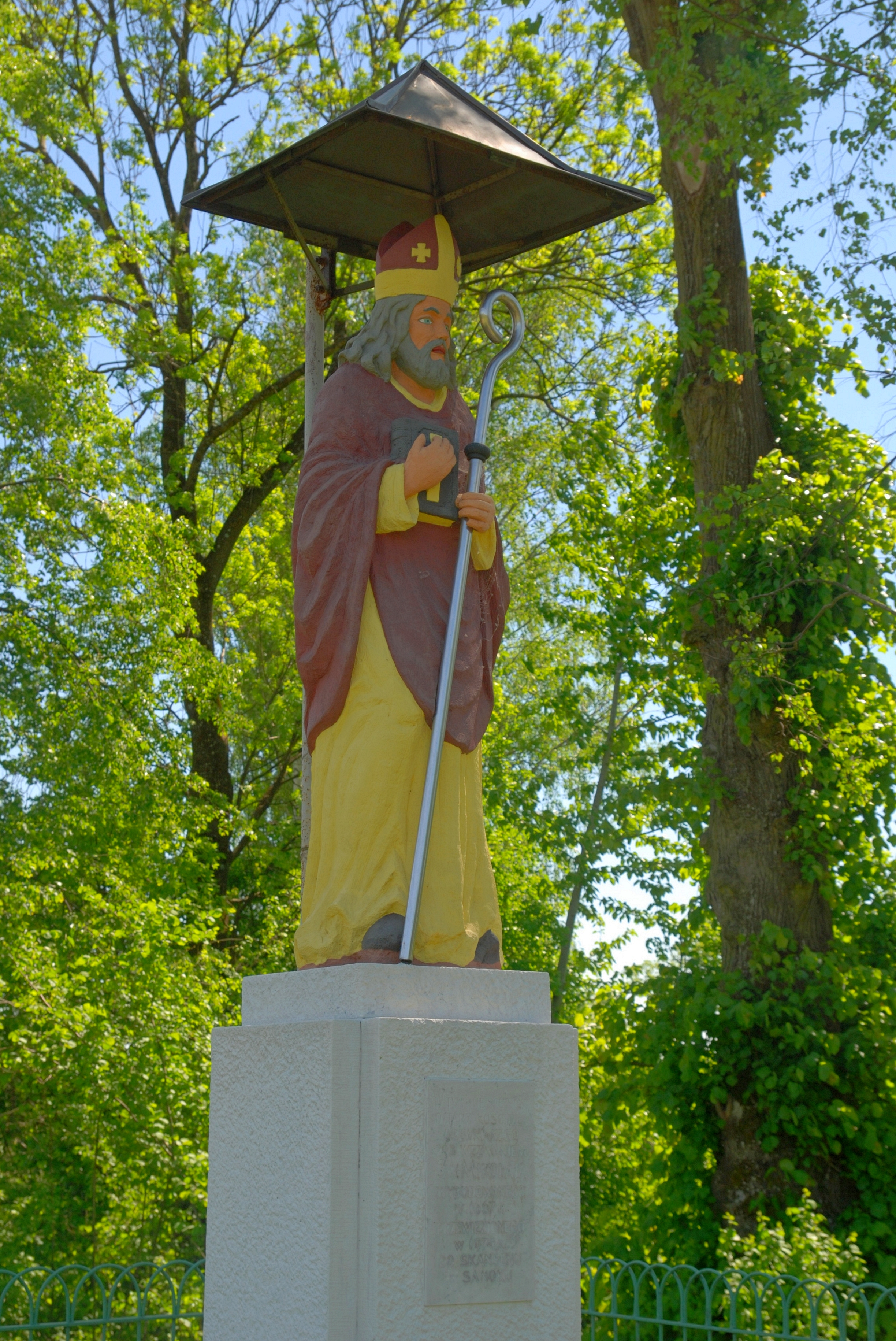 wieś Bączal Dolny